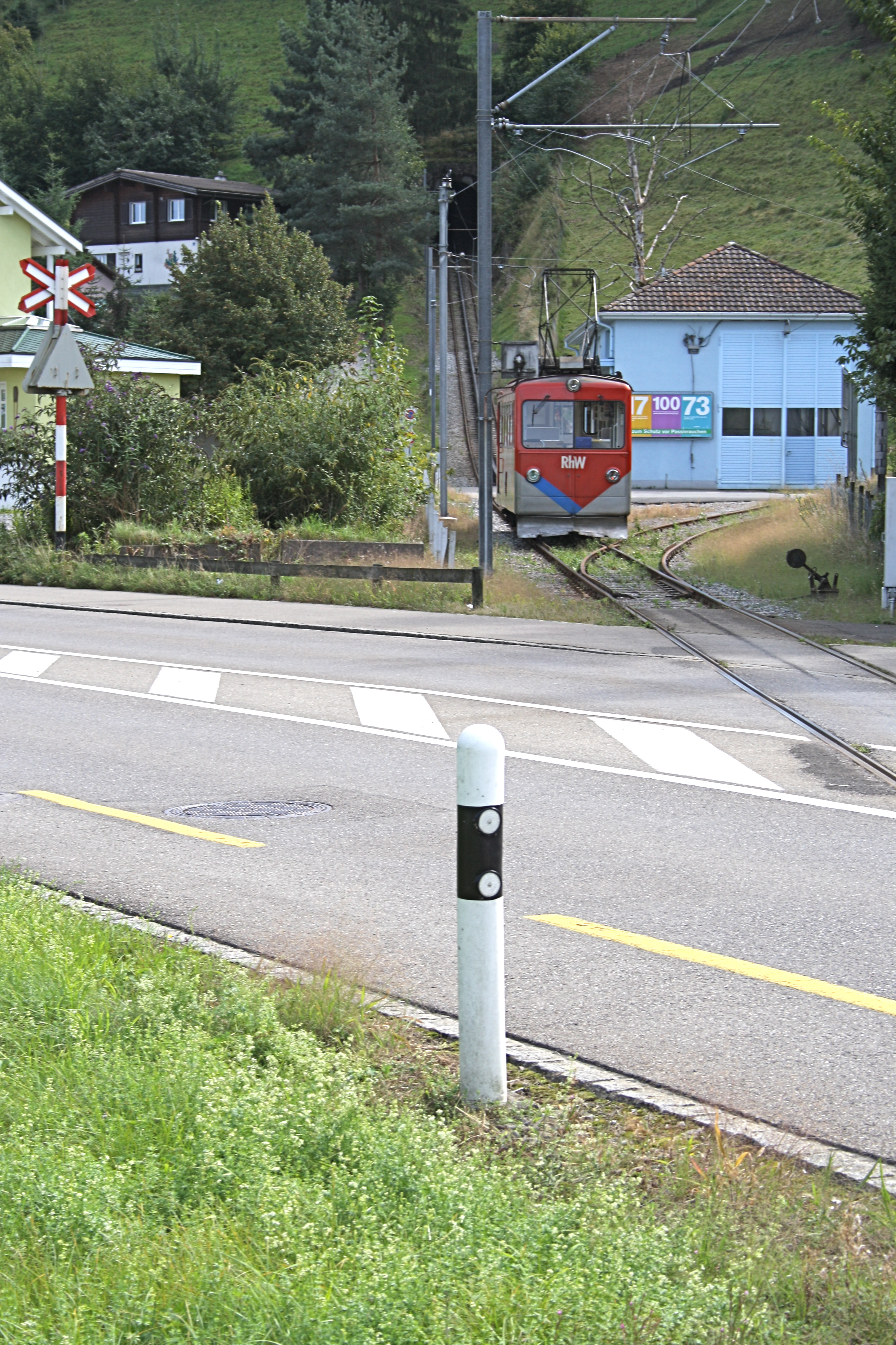 Bergbahn Rheineck-Walzenhausen, Triebwagen am Beginn des Zahnstangenabschnitts